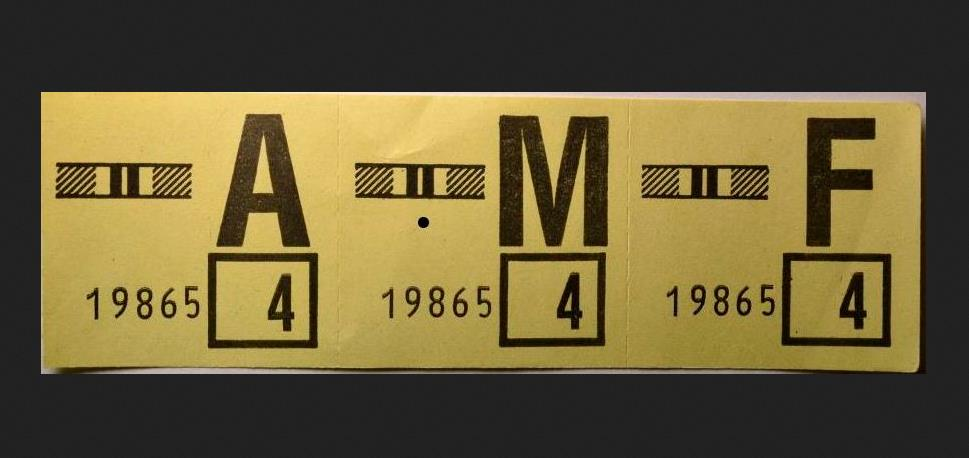 Essennmarken der Bundeswehr um 1975